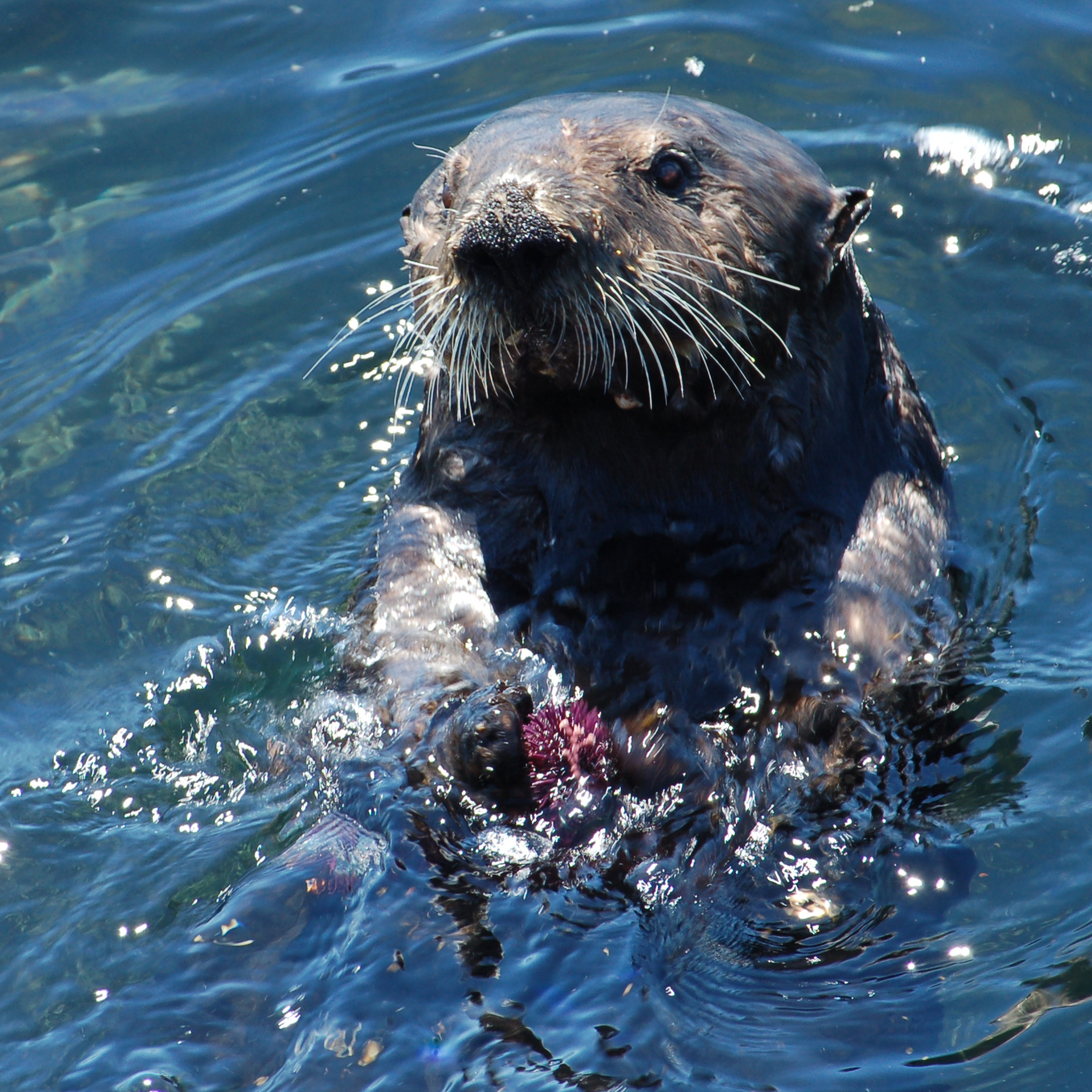 enhydra lutris enjoying some fresh uni